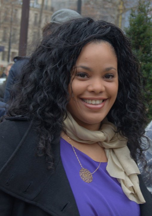 Yahima Torres au déjeuner des nommés des César du cinéma